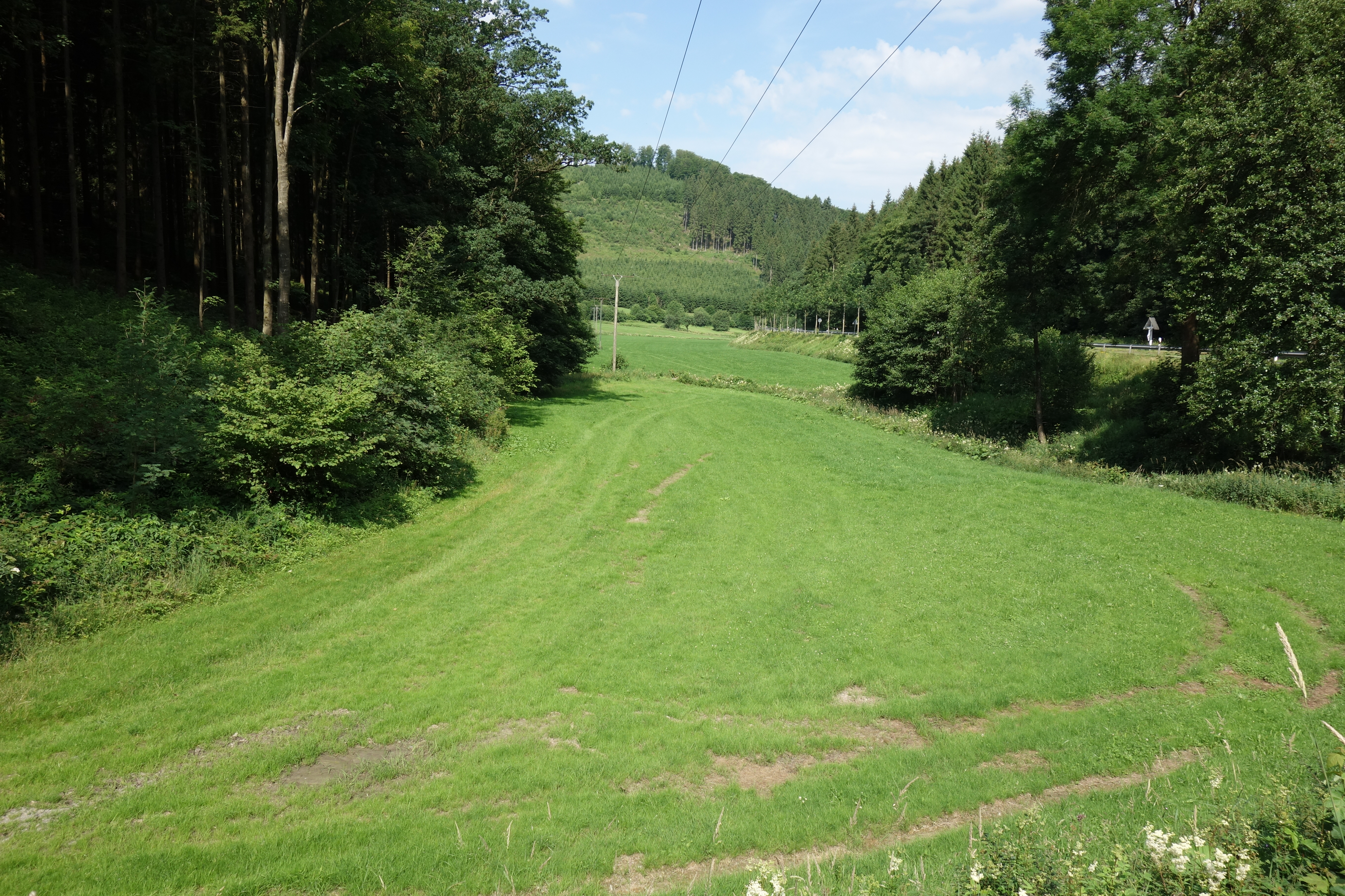 Grünland gehört zum Landschaftsschutzgebiet Talraum Kleine Henne südlich Höringhausen und Wald zum LSG Meschede.